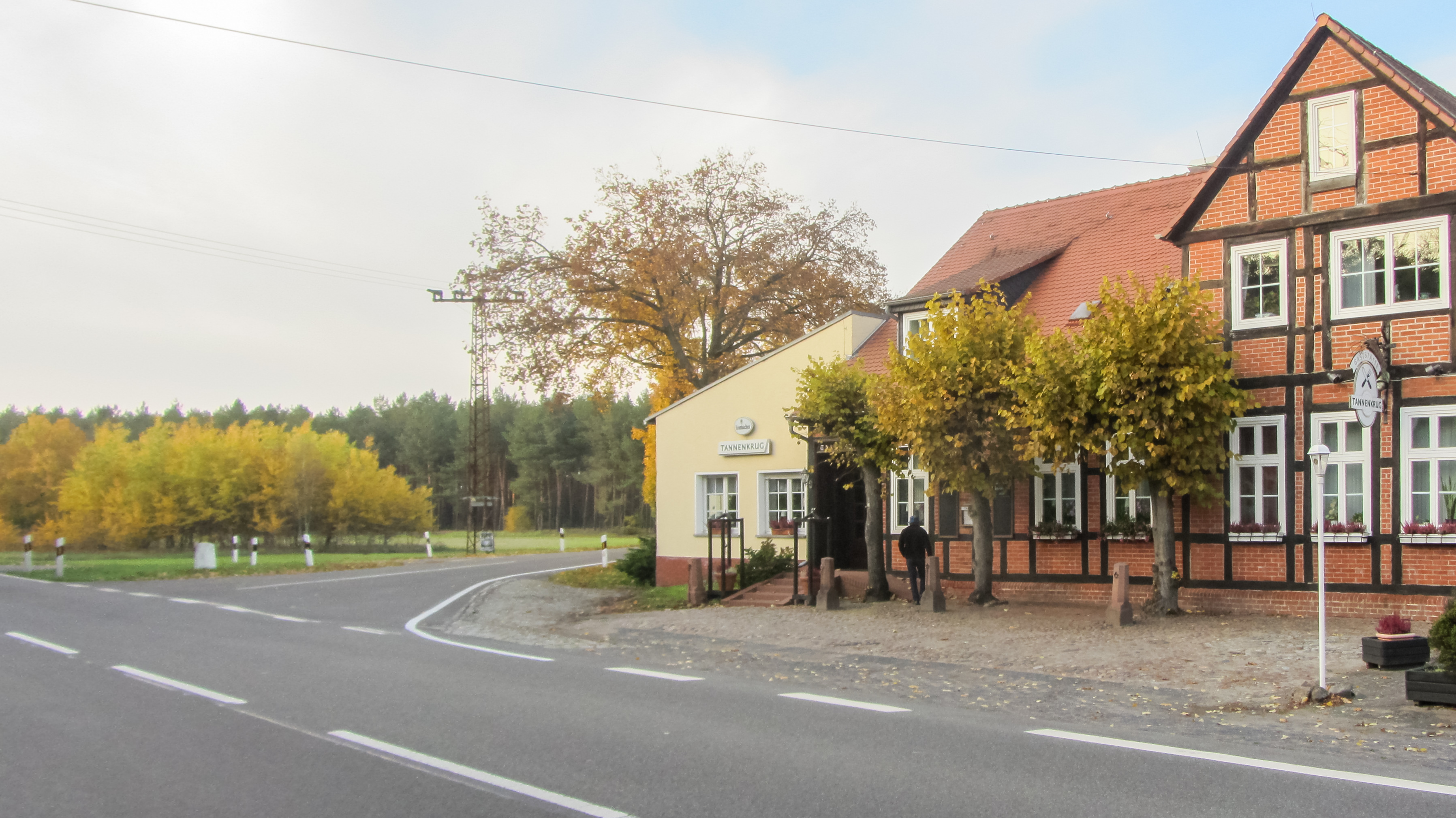 Gasthaus Tannenkrug in Losse OT Tannenkrug. Im Hintergrund ein Preußischer Rundsockelstein